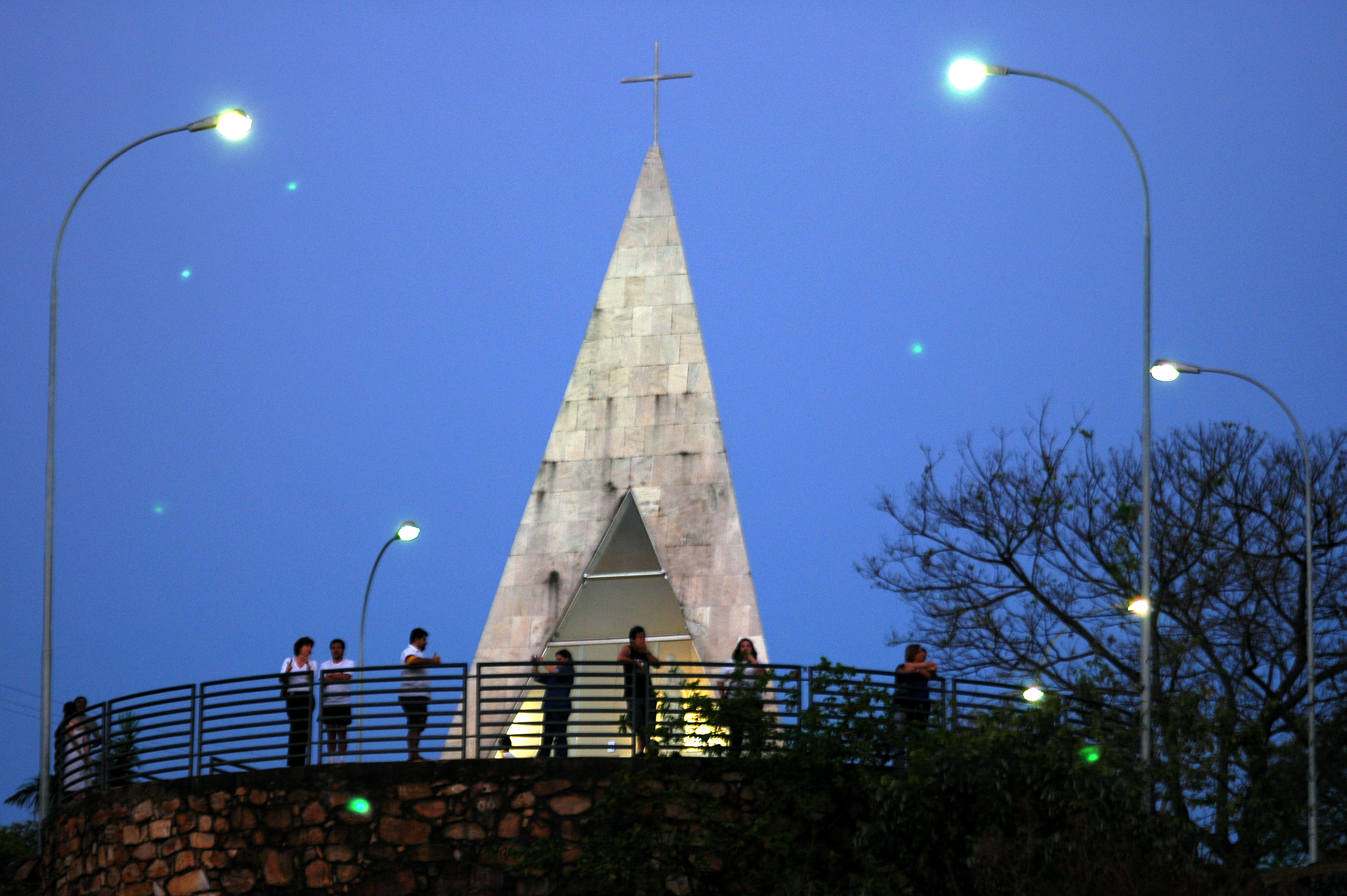 Uma das vistas mais espetaculares da capital. Fotos: Equipe